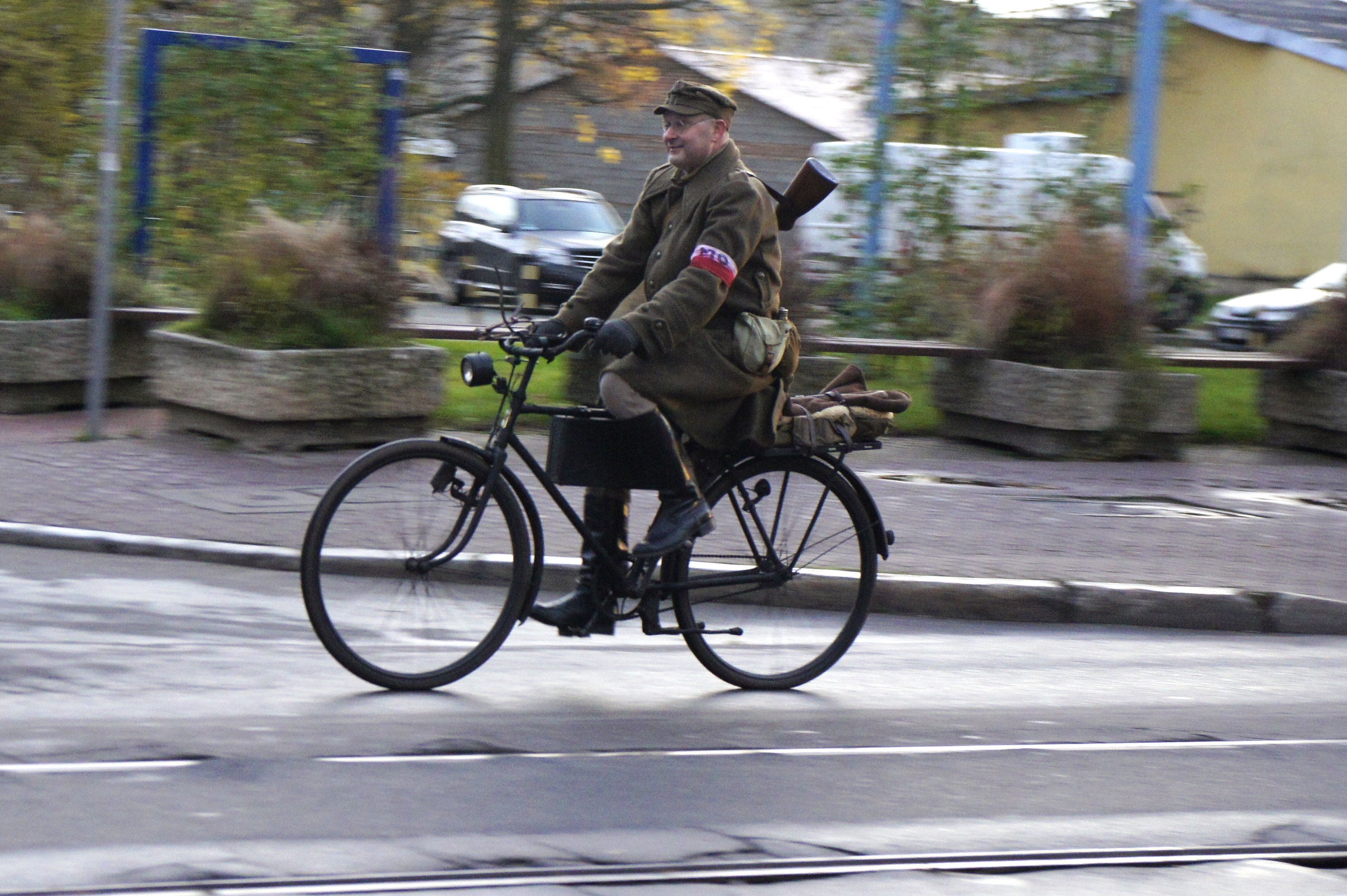 Ziemie Odzyskane, milicjant w 1945 r. - scena prezentowana przez grupę rekonstrukcji historycznych.